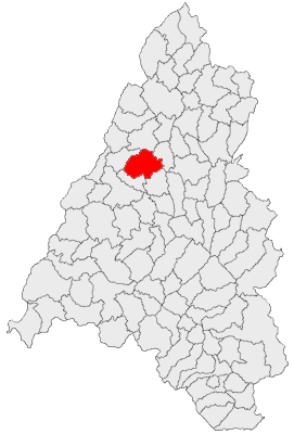 Categorie:Hărţi ale judeţului Bihor